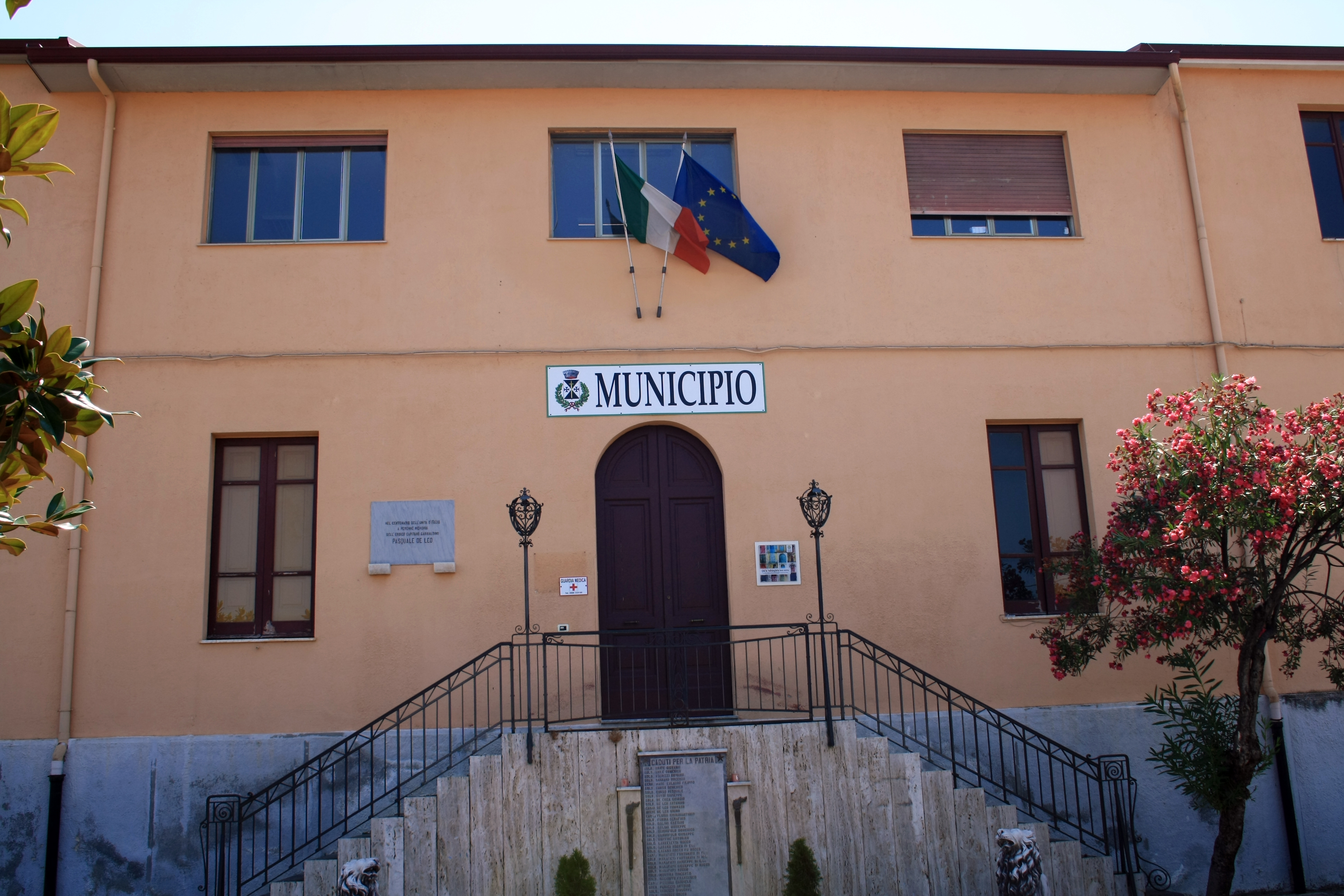 Sede del comune di San Procopio (Provincia di Reggio Calabria - Italy)